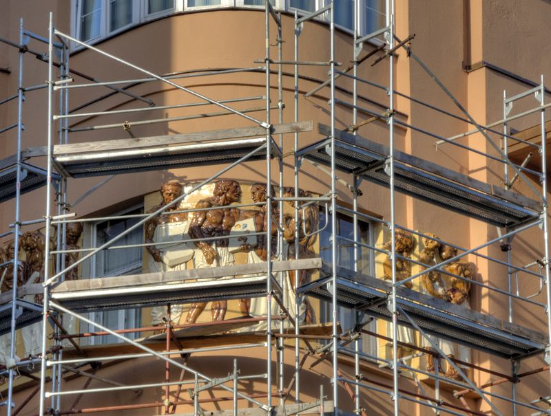 Zagreb